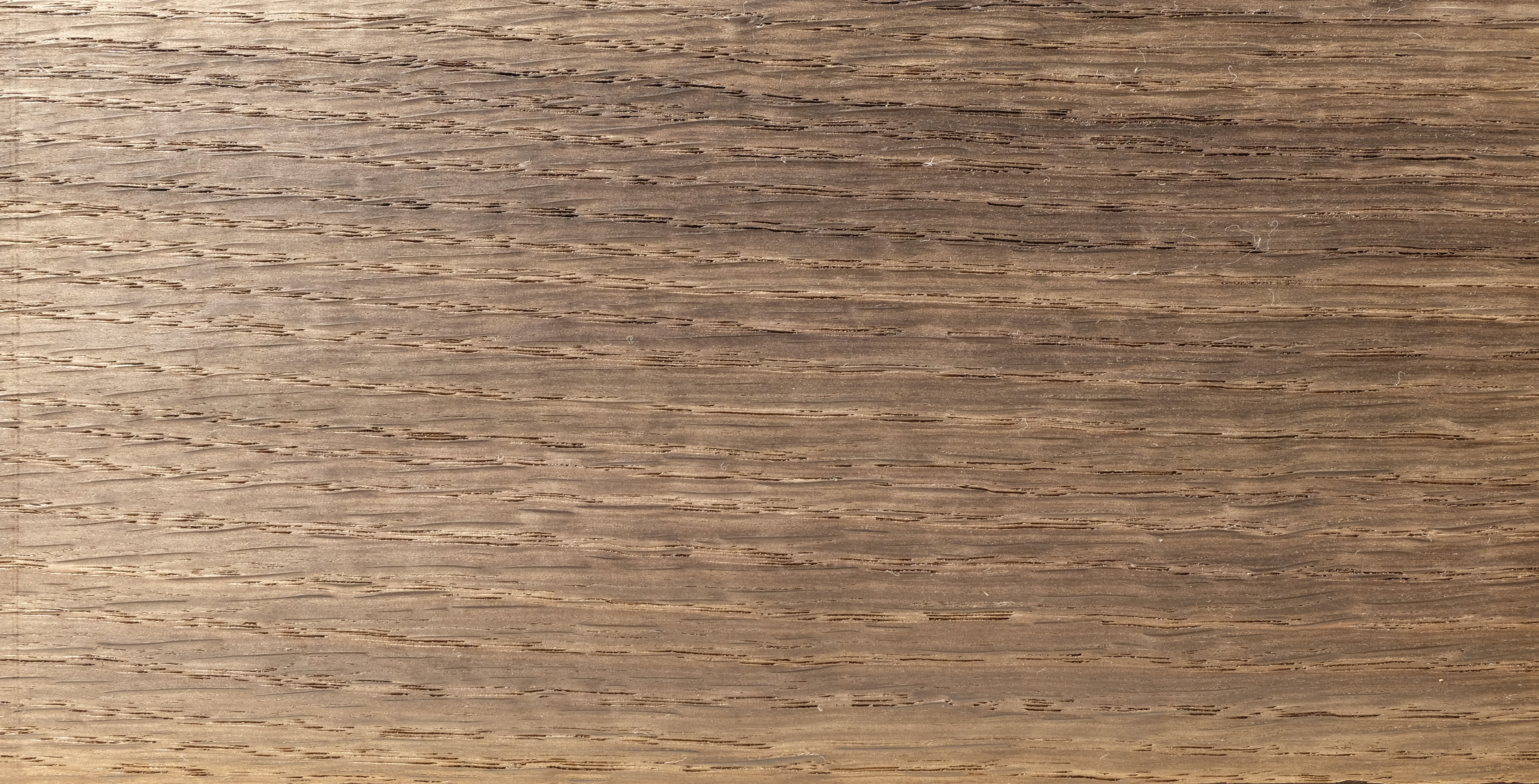 gemessertes Furnier der Mooreiche, geölt, nicht geschliffen